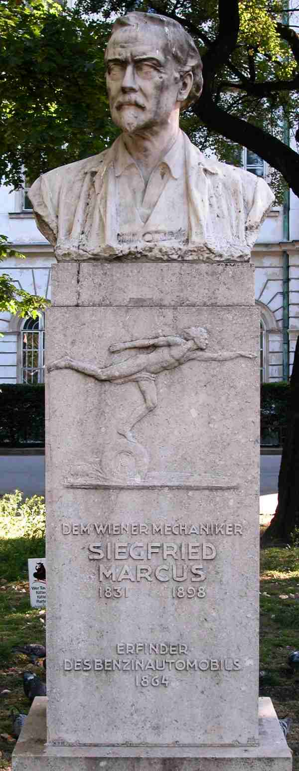 Denkmal für Siegfried Marcus am Karlsplatz (Resselpark)